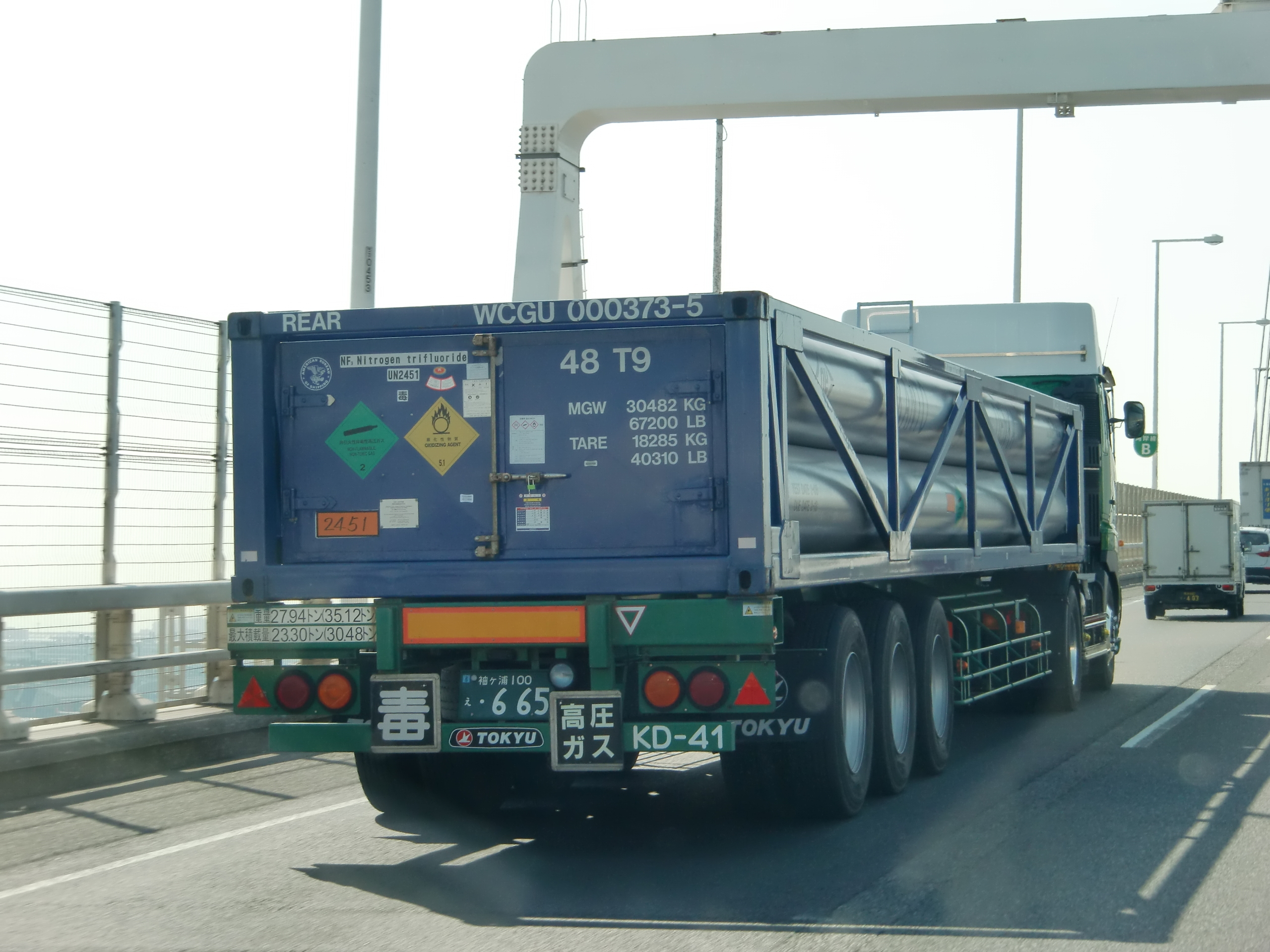 国際海上での『 液化ガス 』輸送用に、アメリカ 『 WELDSHIP INDUSTRIES 』が所有している40ftボンベ型、ガスタンクコンテナ。 ※コンテナタイプコード ( 48T9 ) 使用。 【 神奈川県／横浜港本牧埠頭にて 】